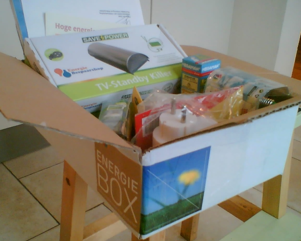 Zelfgemaakt, van mijn energiebox in december 2006. Camera: NOKIA mob.tel.